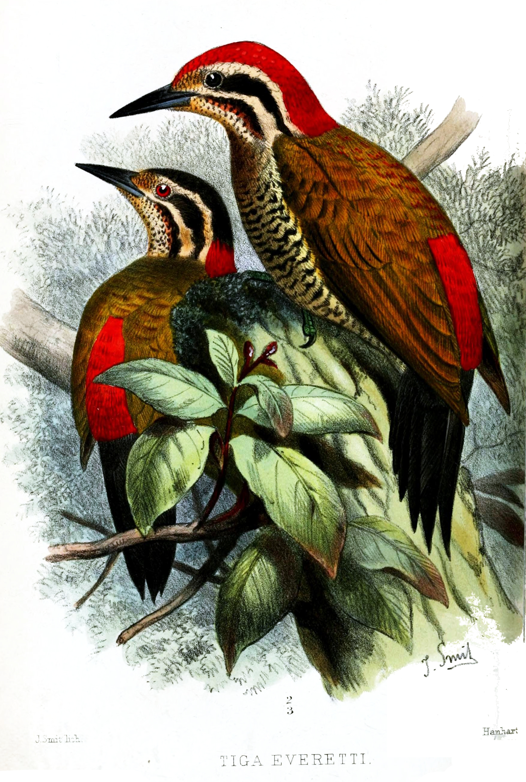 Tiga everetti = Dinopium everetti[1]